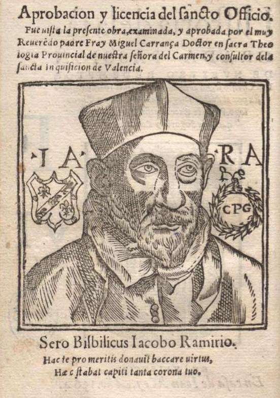 Retrato de Diego Ramírez Pagán. Xilografía anónima. Ilustración de la "Historia de la sagrada Passion de nuestro Redemptor Iesu Christo..." En Valencia, en casa de Ioan Mey. Año 1564